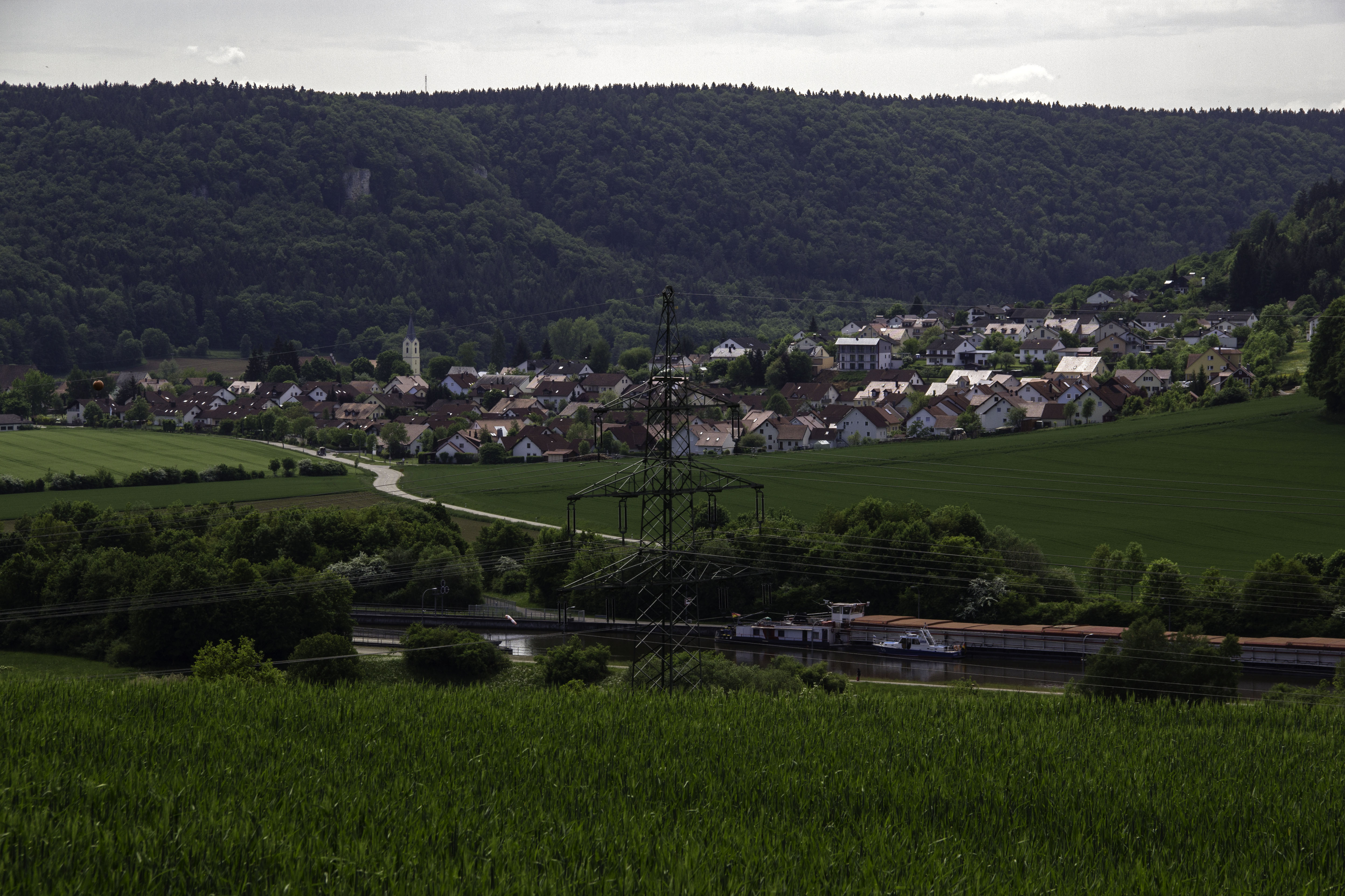 Blick auf den Dietfurter Ortsteil Töging, von Norden